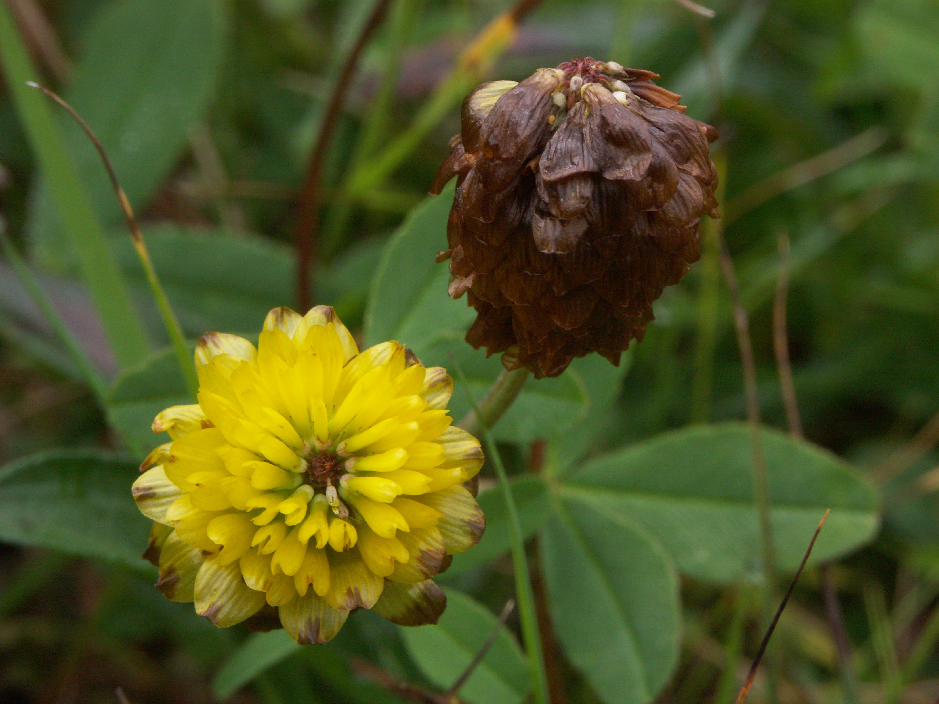 Blüten des Braun-Klees (Trifolium badium) am Pordoi-Pass (Passo Pordoi), Südtirol, Italien. Gut erkennbar ist die Veränderung der Blüten von gelb nach braun nach der Bestäubung.